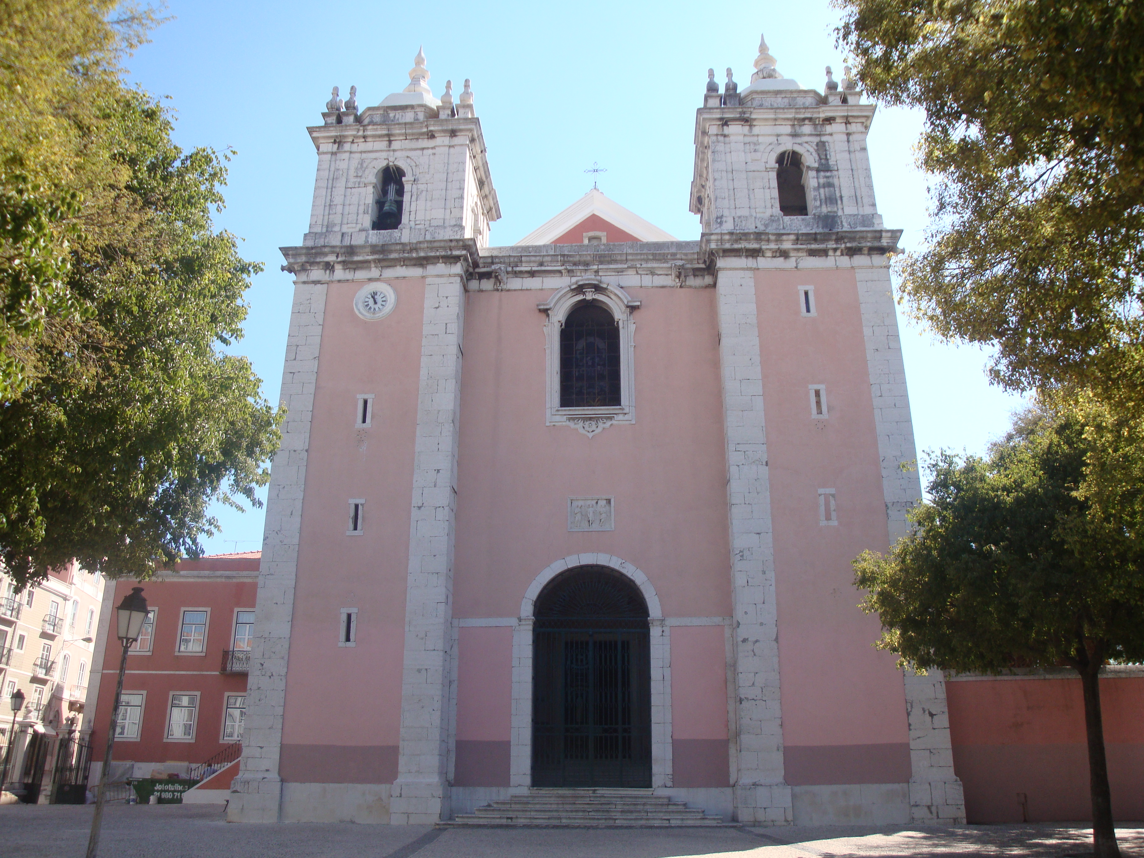 Igreja de Santos-o-Velho; Lisboa